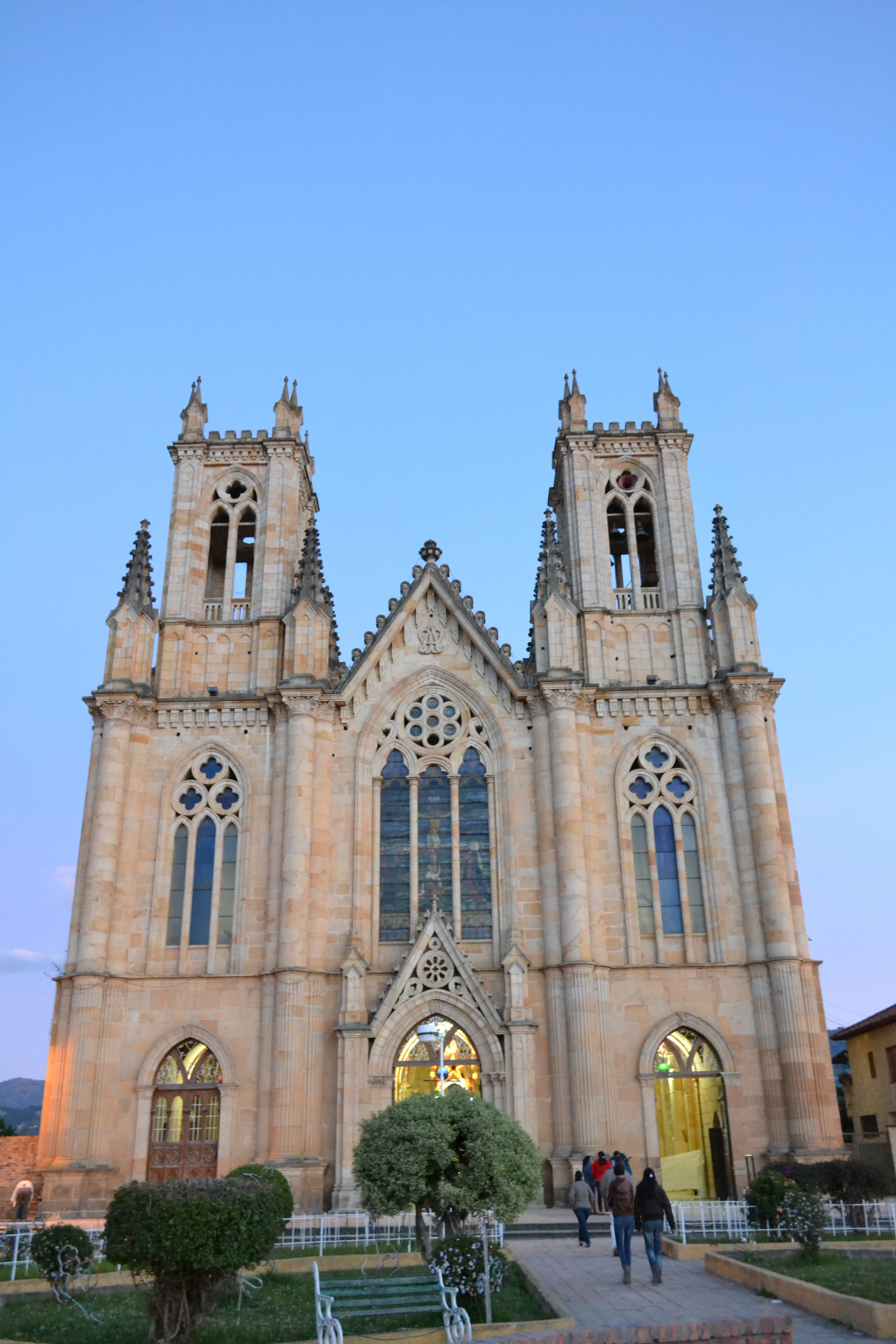 Iglesia Nuestra Señora de las Nieves